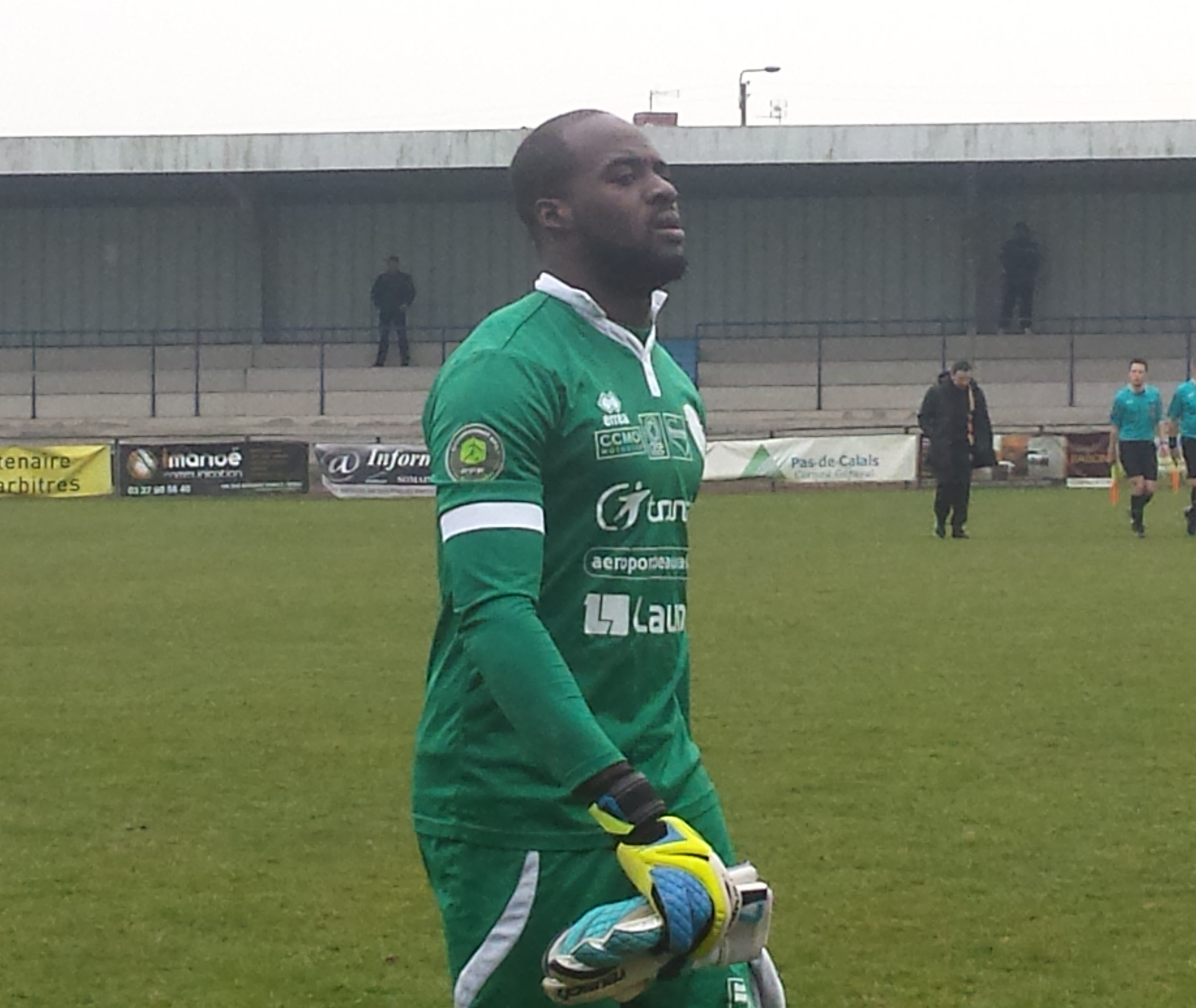 Germain Sanou à la mi-temps du match Lens B - AS Beauvais, comptant pour la vingt-deuxième journée du championnat de CFA (quatrième division française), le 14 mars 2015.